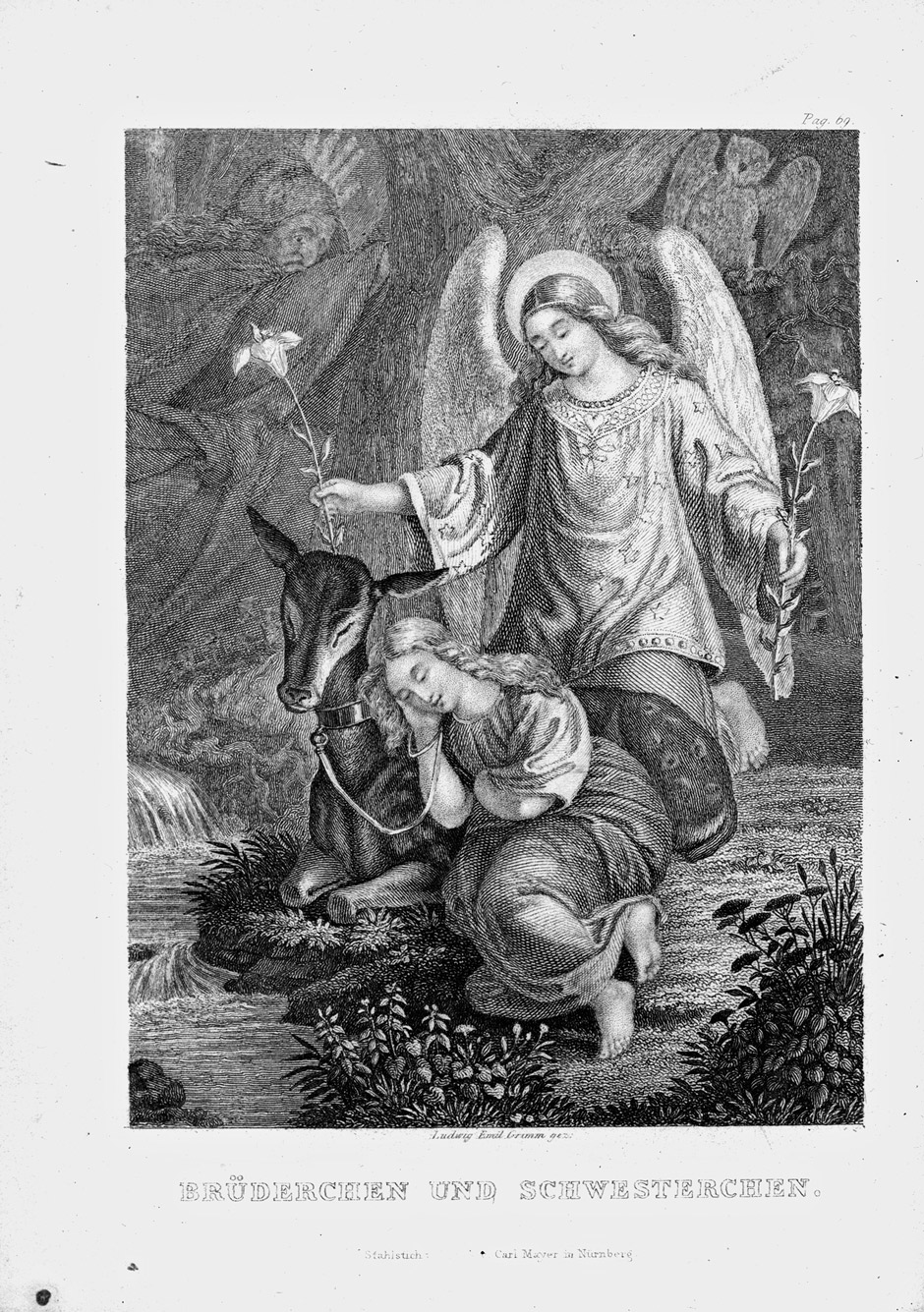 Brüderchen und Schwesterchen; aus: Grimm Kinder- und Hausmärchen, Große Ausgabe. 7. Aufl. Göttingen, Dieterich, 1857.